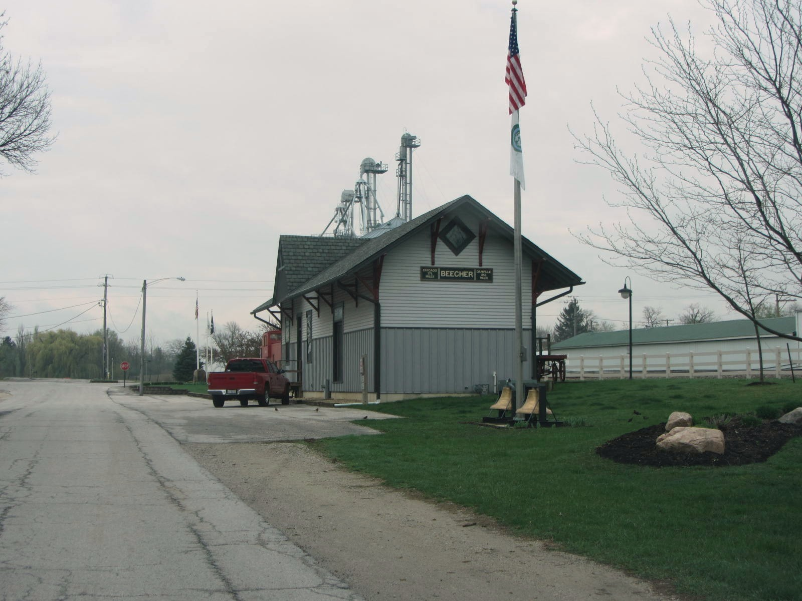 Beecher, Illinois